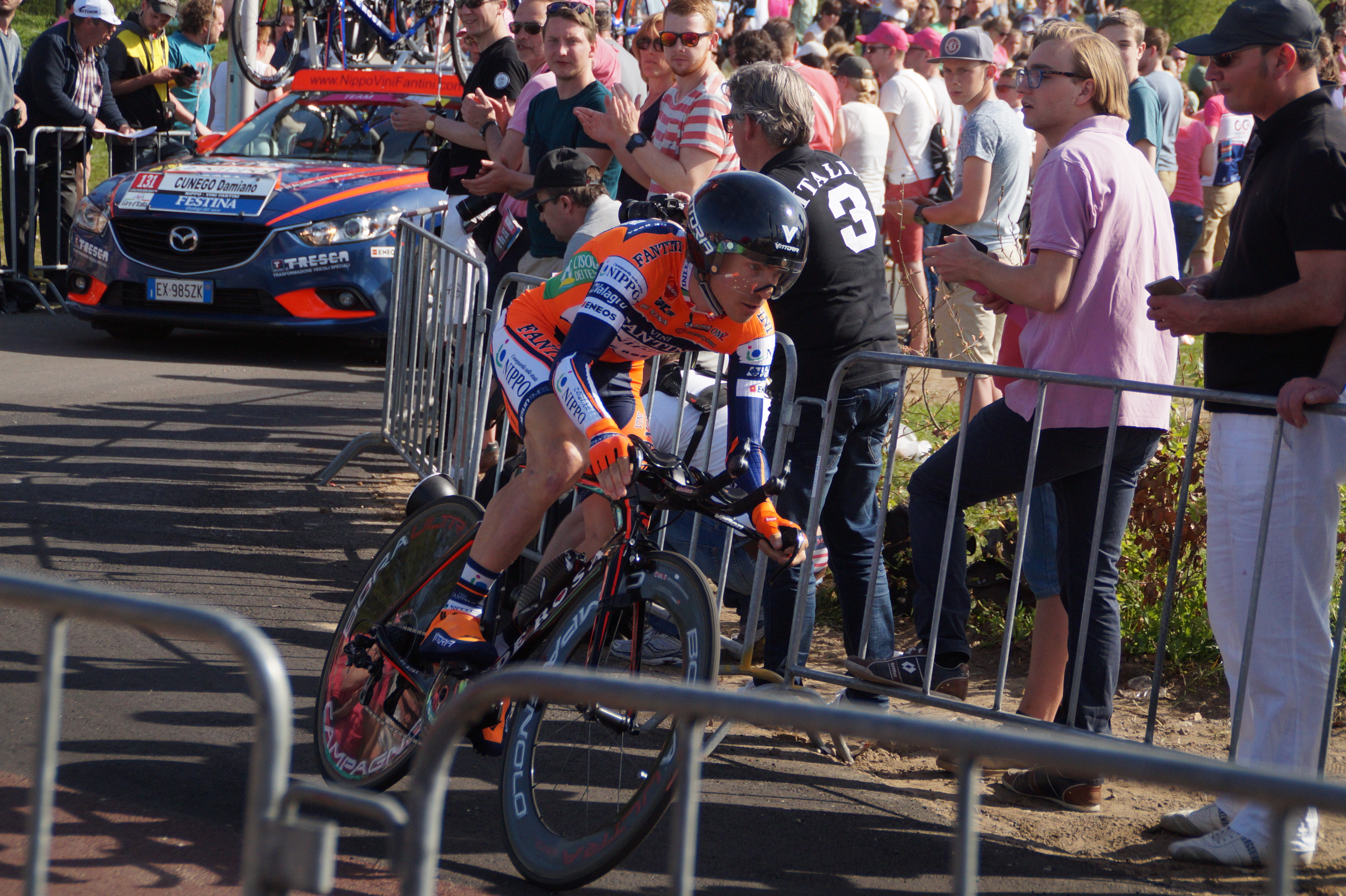 DSC05007 Damian Cunego